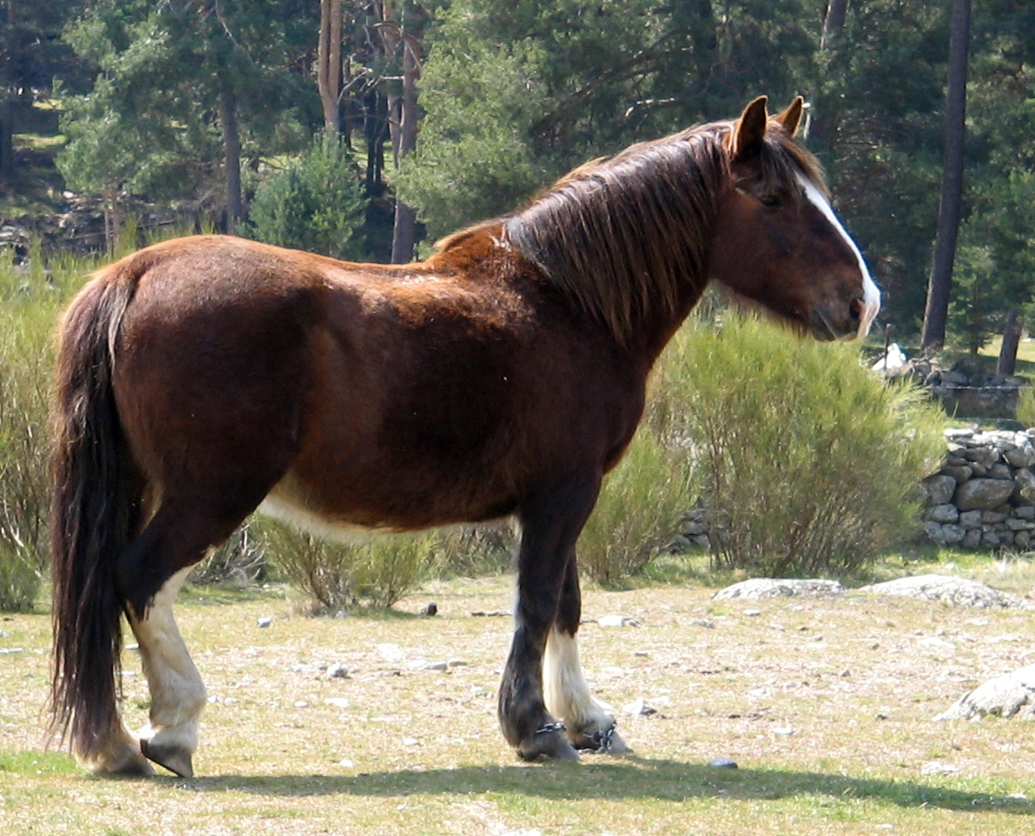 Caballos en la Sierra de Gredos (Ávila, España). Probably Hispano-Breton breed (chestnut coat color & breeding area in mountain zones - Castilla-y-Leon)